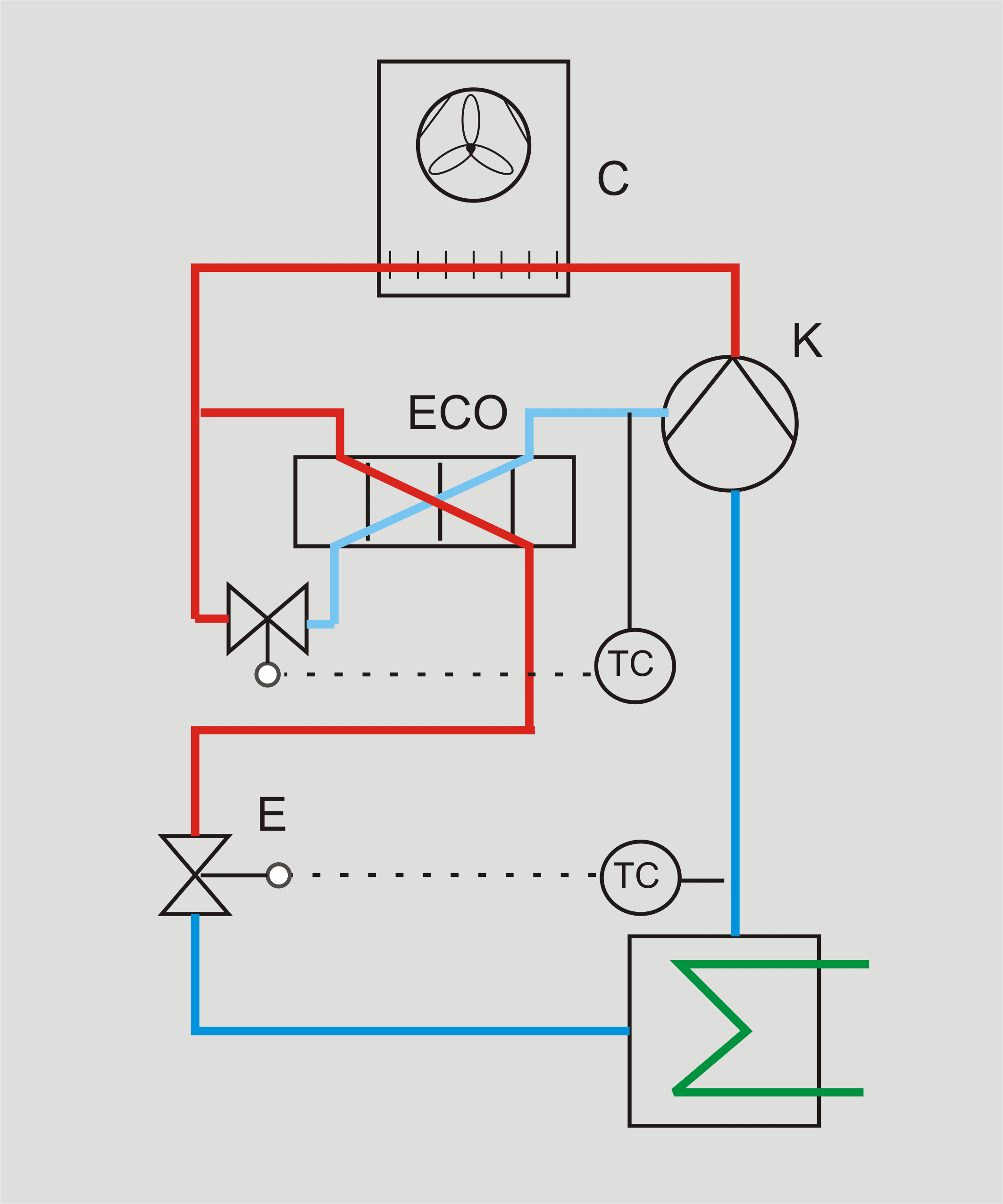 Kälteanlage mit Economiser